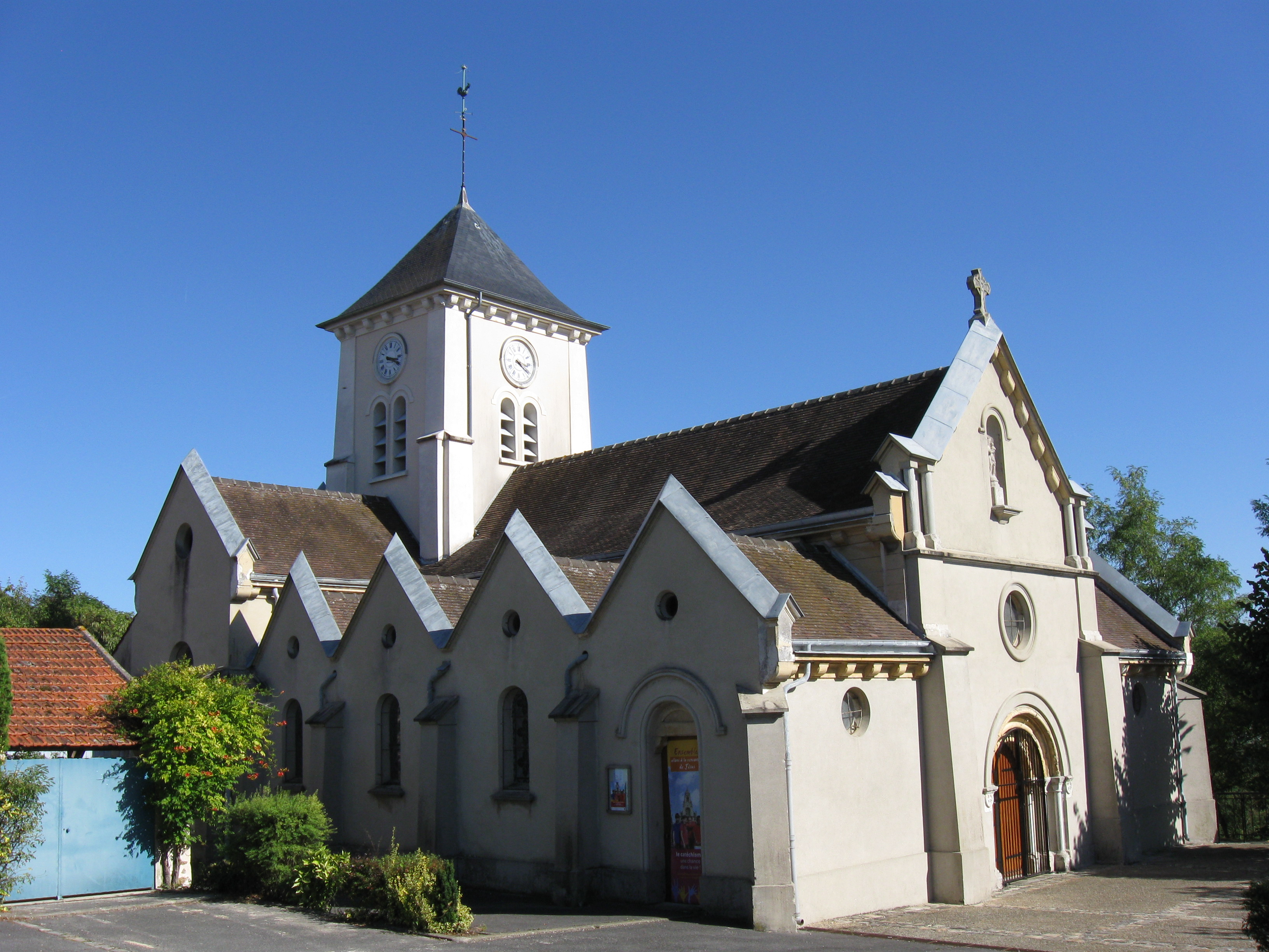 Église catholique Saint-Rémy de Méry-sur-Marne (Seine-et-Marne, région Île-de-France).